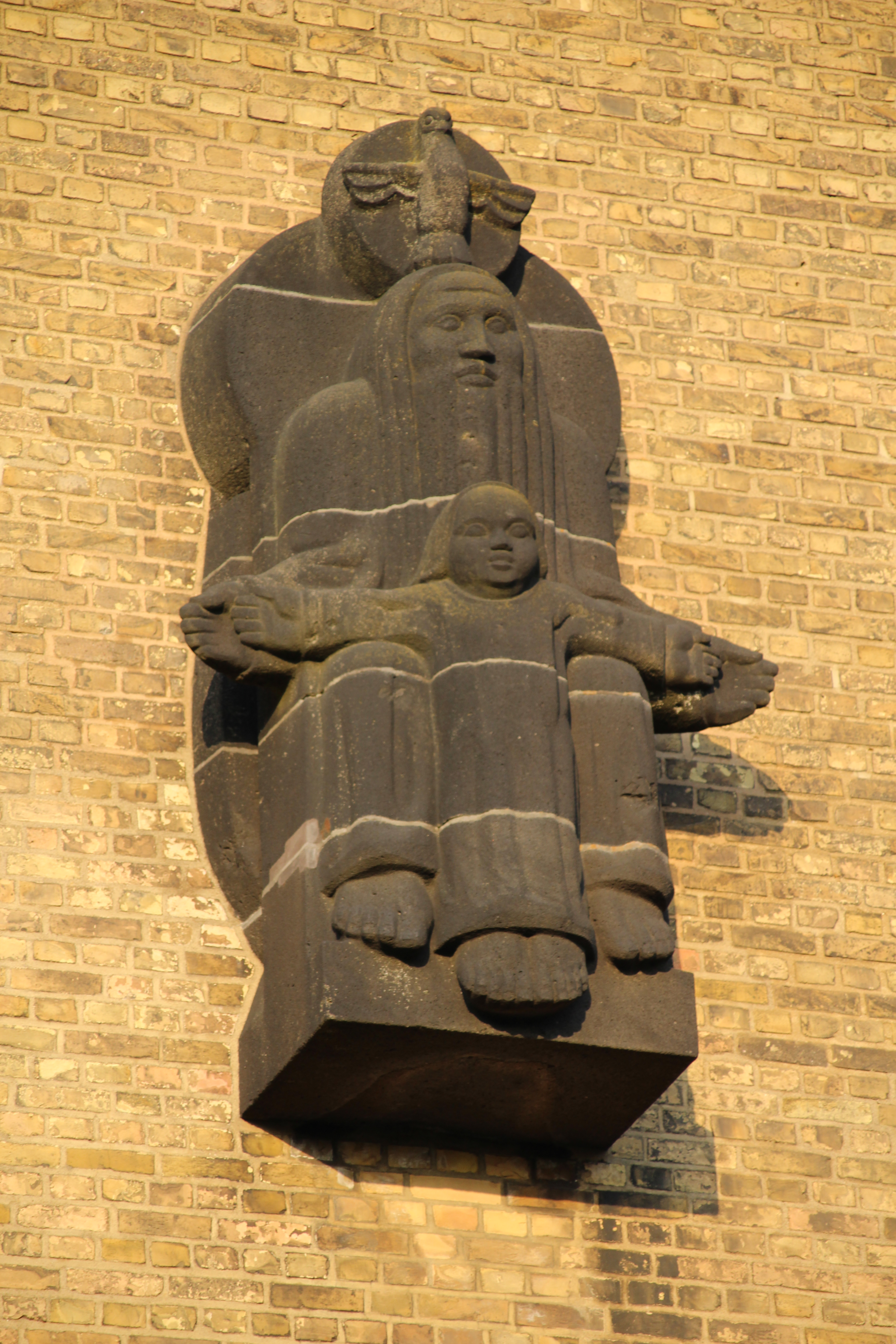 Gnadenstuhl von Jupp Rübsam an der Westfassade der Herz-Jesu-Kirche der LVR-Klinik Düren.